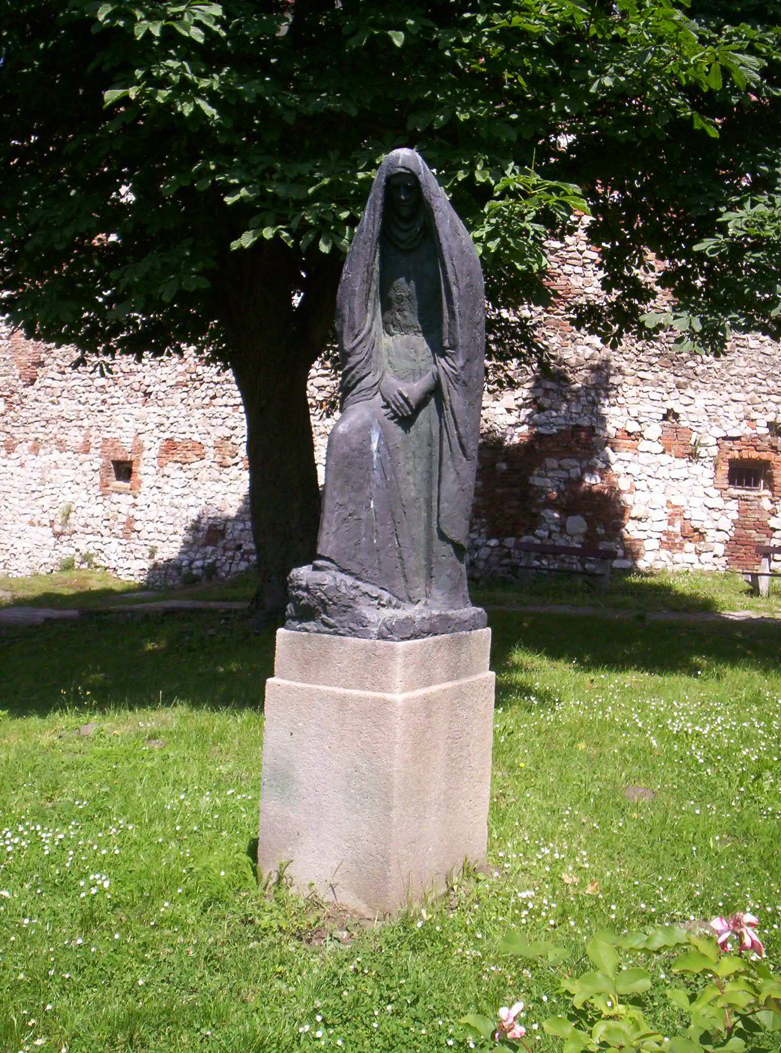 Kanizsai Dorottya szobra Siklóson. Borsos Miklós alkotása. (bronz, 1970)